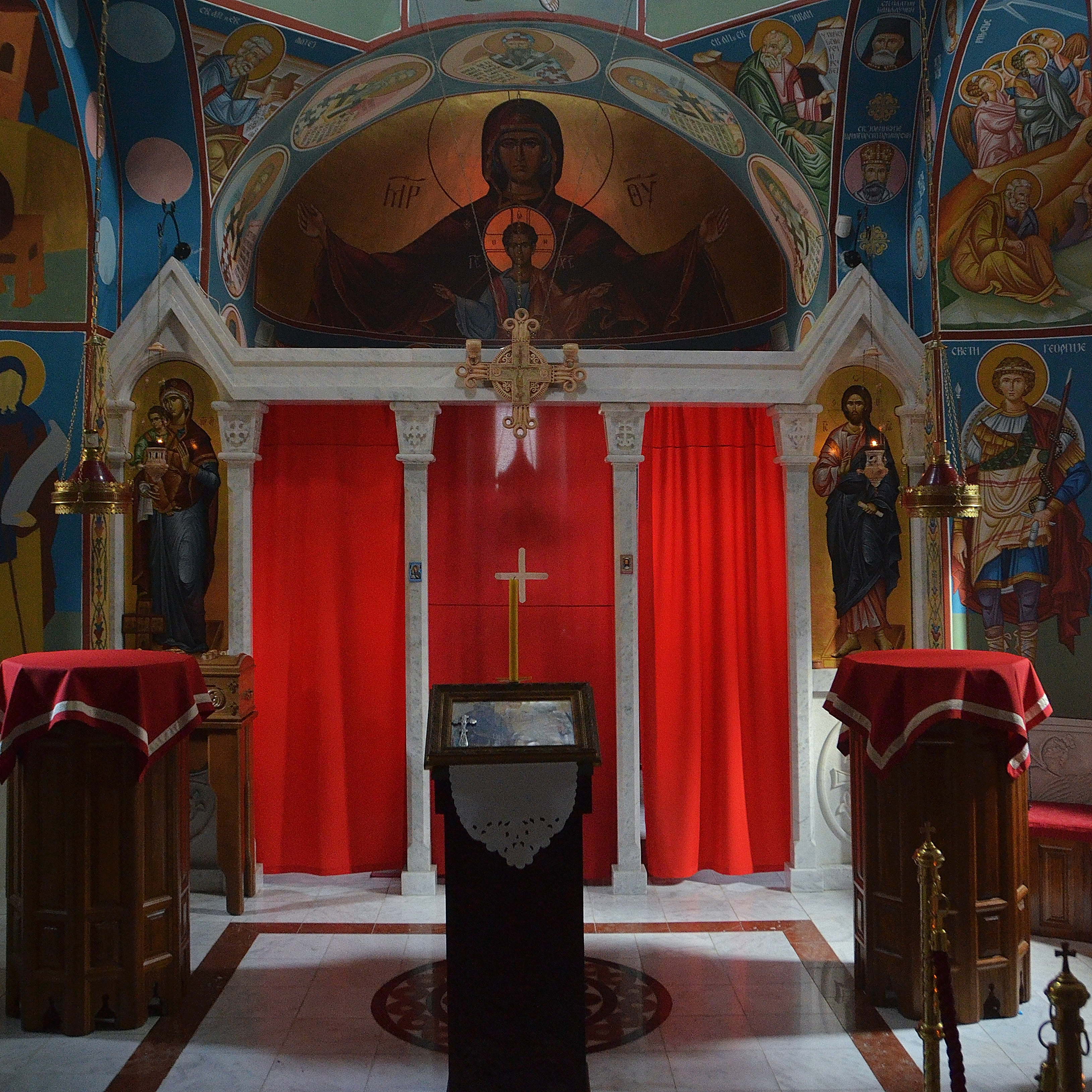 Из записа Вука Караџића зна ce да је Јовање било лавра и имало улогу централног места из кога се управљало осталим манастирима у „Српској Светој гори“.